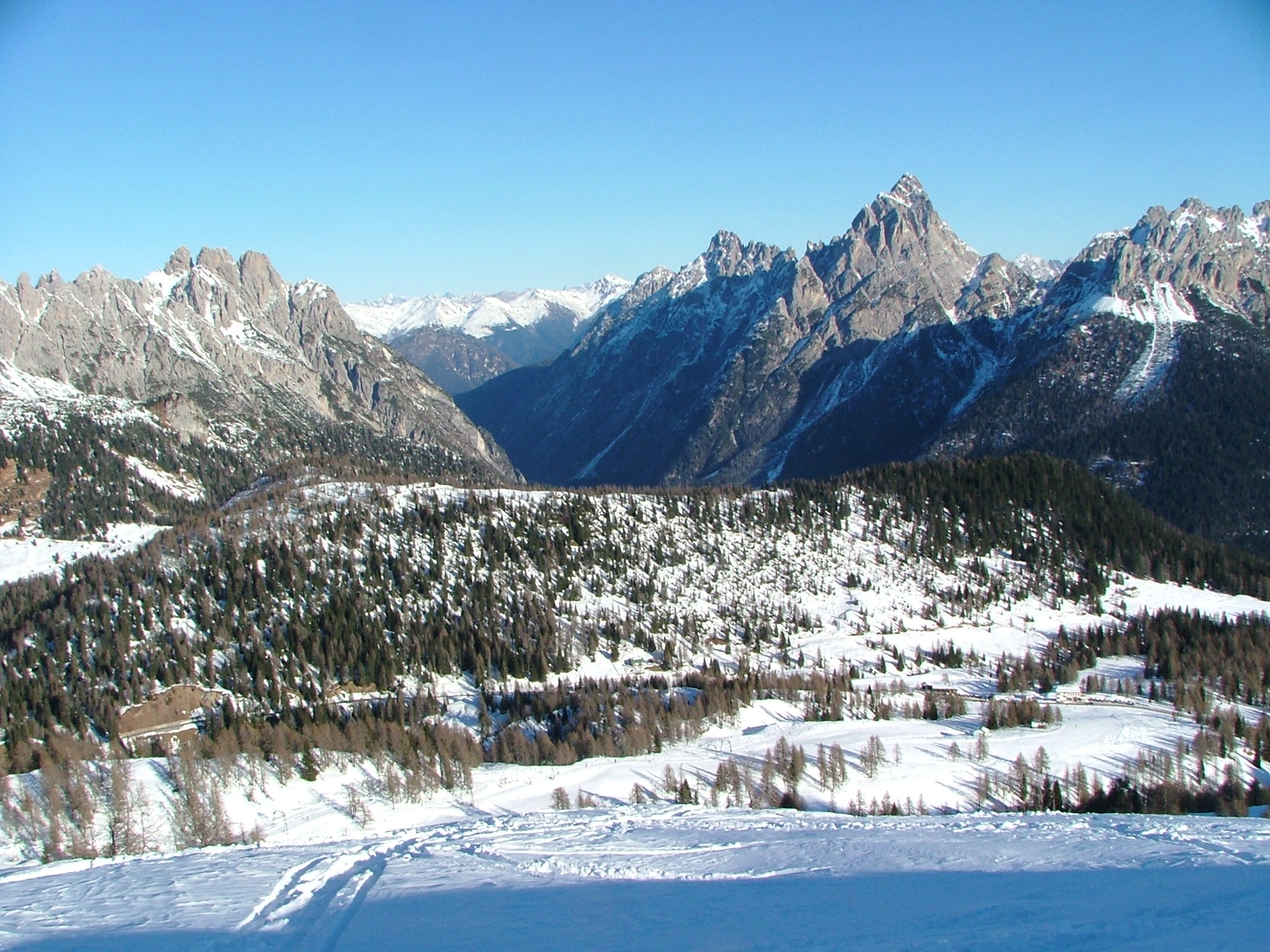 Piani di Razzo, Vigo di Cadore, Belluno, Dolomites, Veneto, Italy